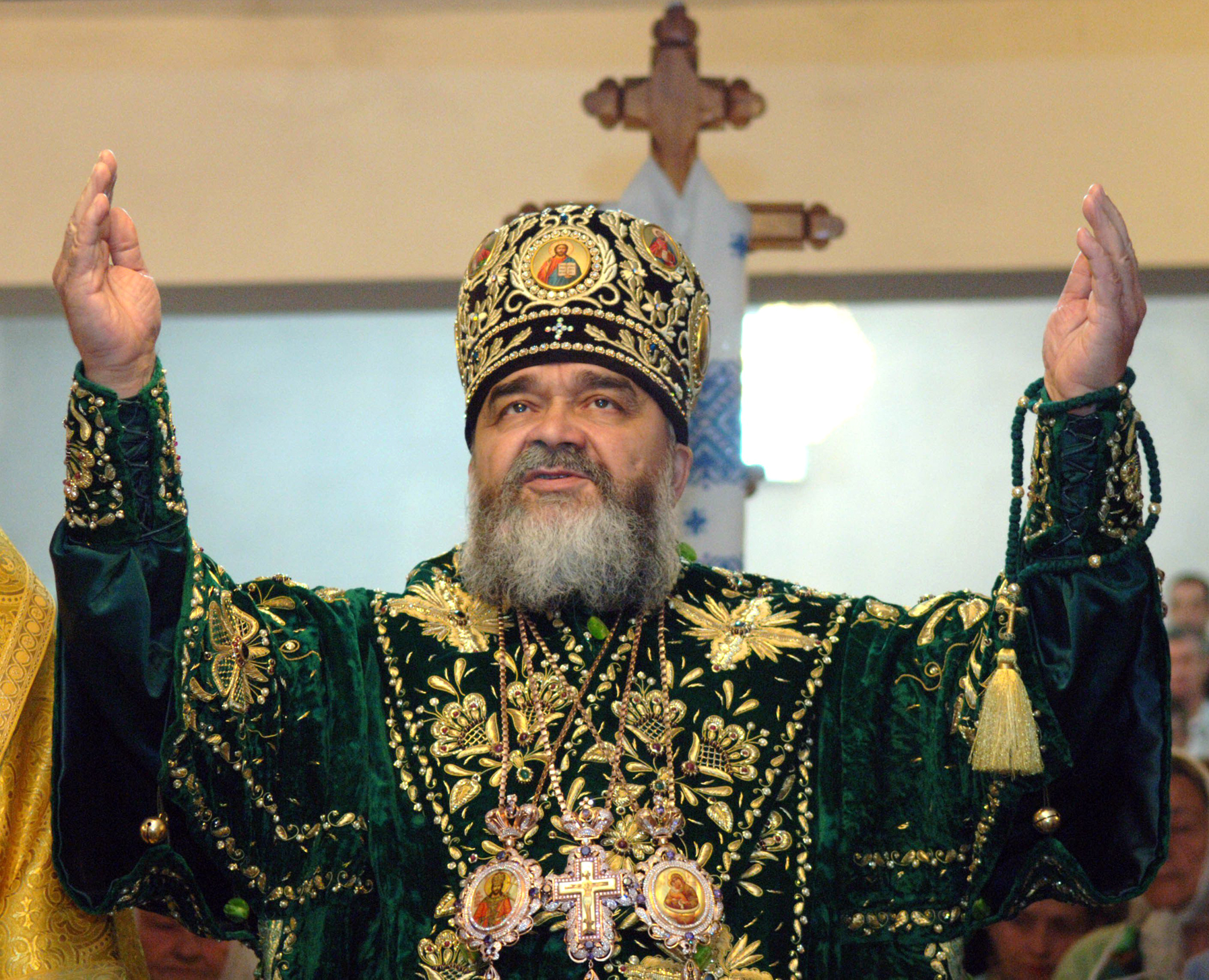 «До неба піднесімо серця». Блаженніший Митрополит Мефодій очолив Божественну літургію у Свято-Андріївському храмі м. Дрогобича з нагоди встановлення співпричастя між УАПЦ та Самборсько-Дрогобицькою єпархією УПЦ Київського Патріархату. 8 липня 2007 р.